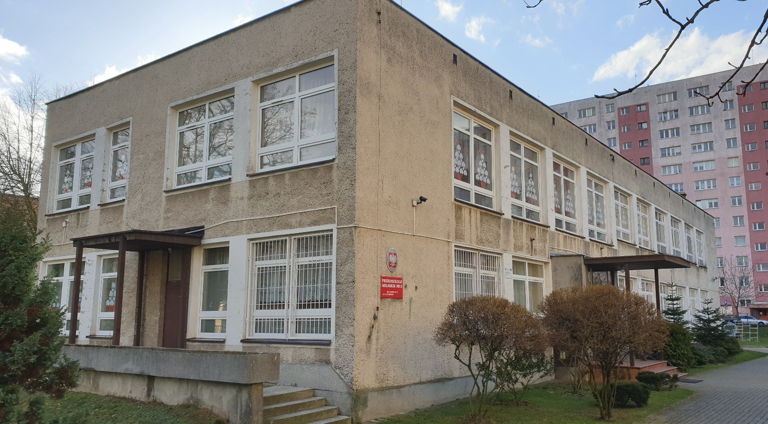 Stargard. Przedszkole Miejskie nr 3